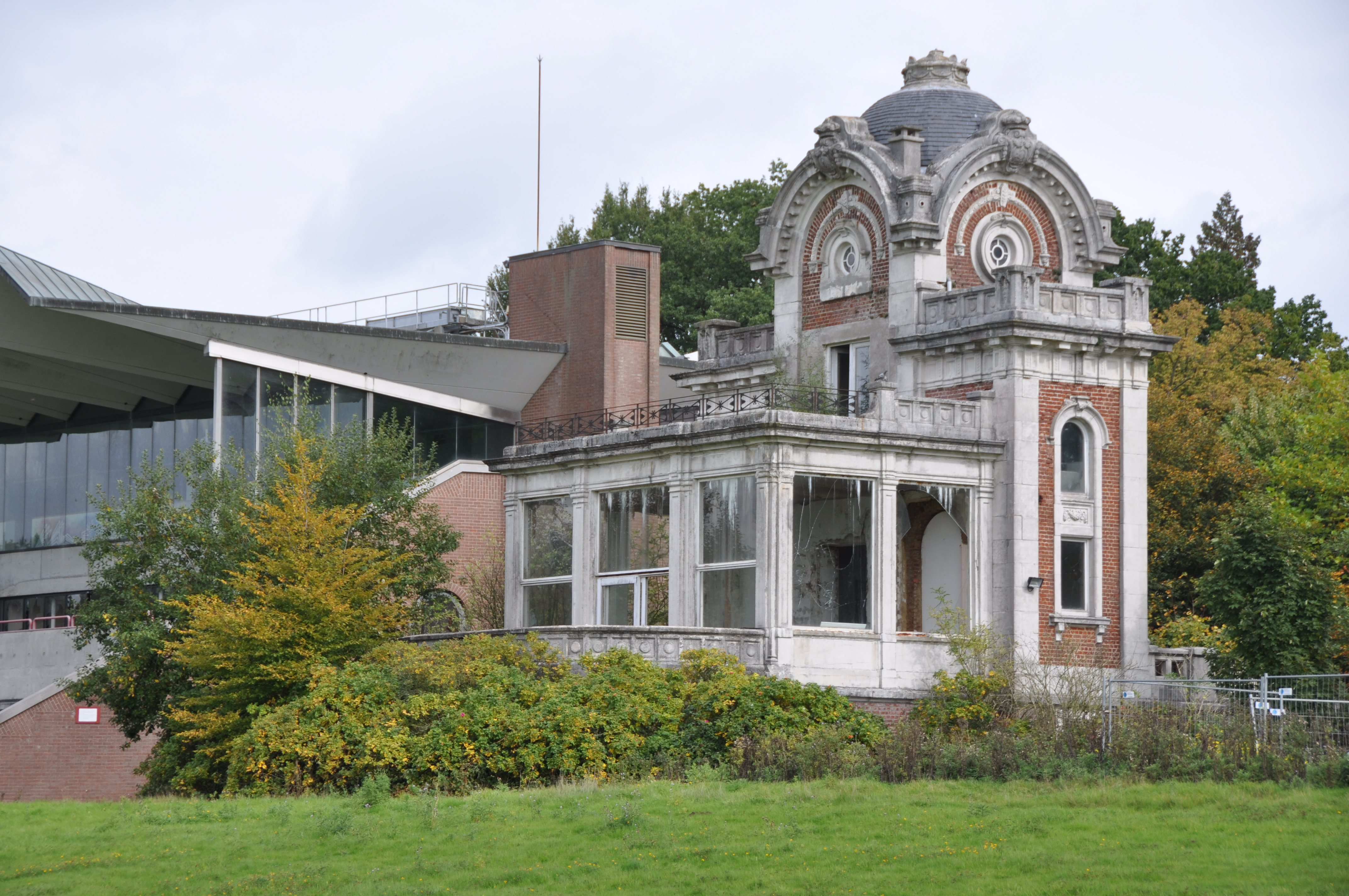 Hippodrome de Groenendael